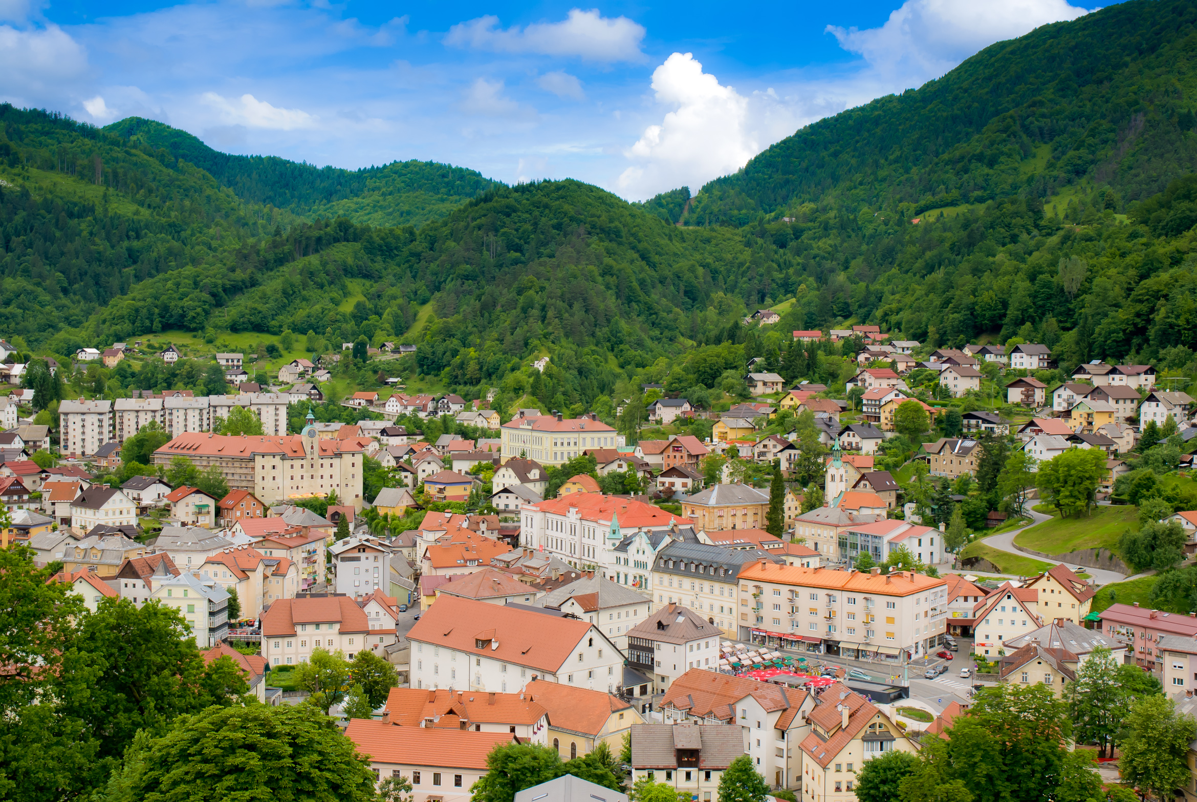 Pogled na mesto Idrija.